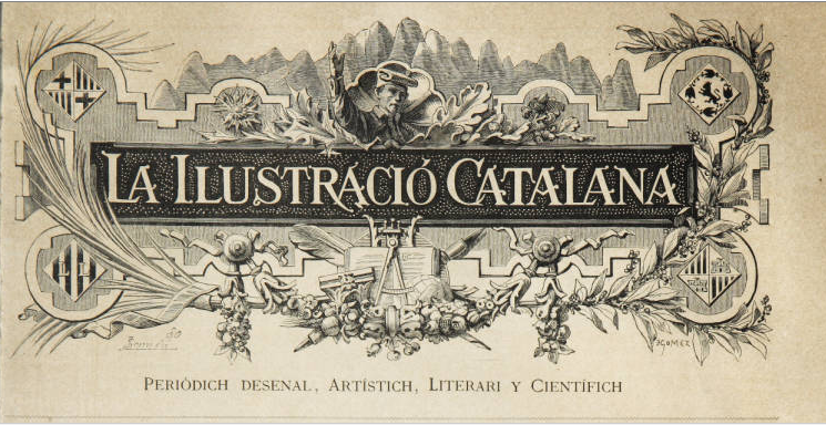 Ilustració Catalana, primera època, número 009 pàg. 65